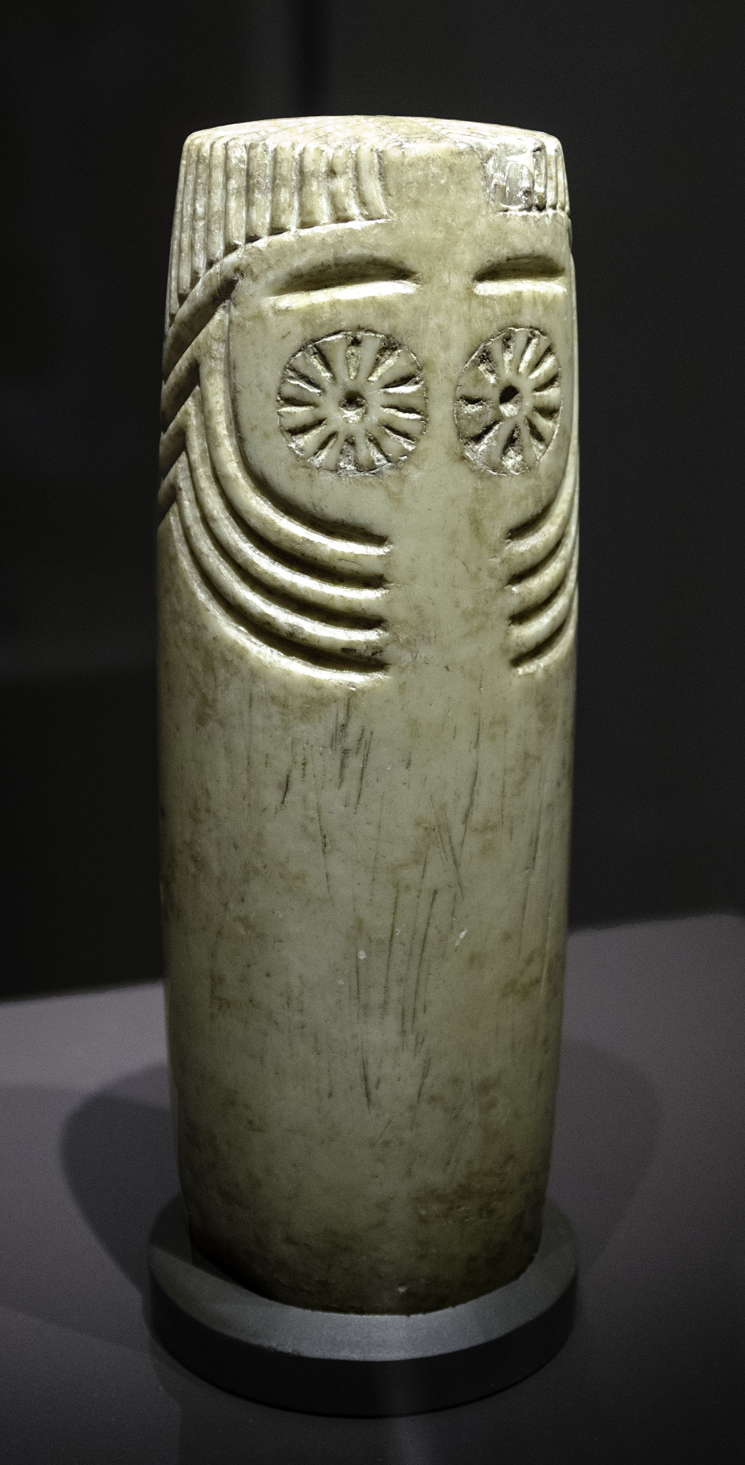 Fue tallado en alabastro en la Edad del Cobre, hace unos cinco mil años. Mide unos 19 cm de altura y unos 7 de diámetro máximo. Muestra una cara estilizada en su frente aunque está decorado en todo su perímetro. Los ojos constituyen el elemento común entre diversos ídolos conocidos como "oculados". En ellos se destacan ojos, cejas, pelo y un posible "tatuaje facial". Está datado en el 2500 a. C. Se le conoce como "Ídolo de Extremadura" aunque se considera que es más probable que proceda del Sur del valle del Guadalquivir. Altura:19 cm; diámetro máximo:7 cm; diámetro base: 5 cm. Nº inv. 20572. Museo Arqueológico Nacional de España.